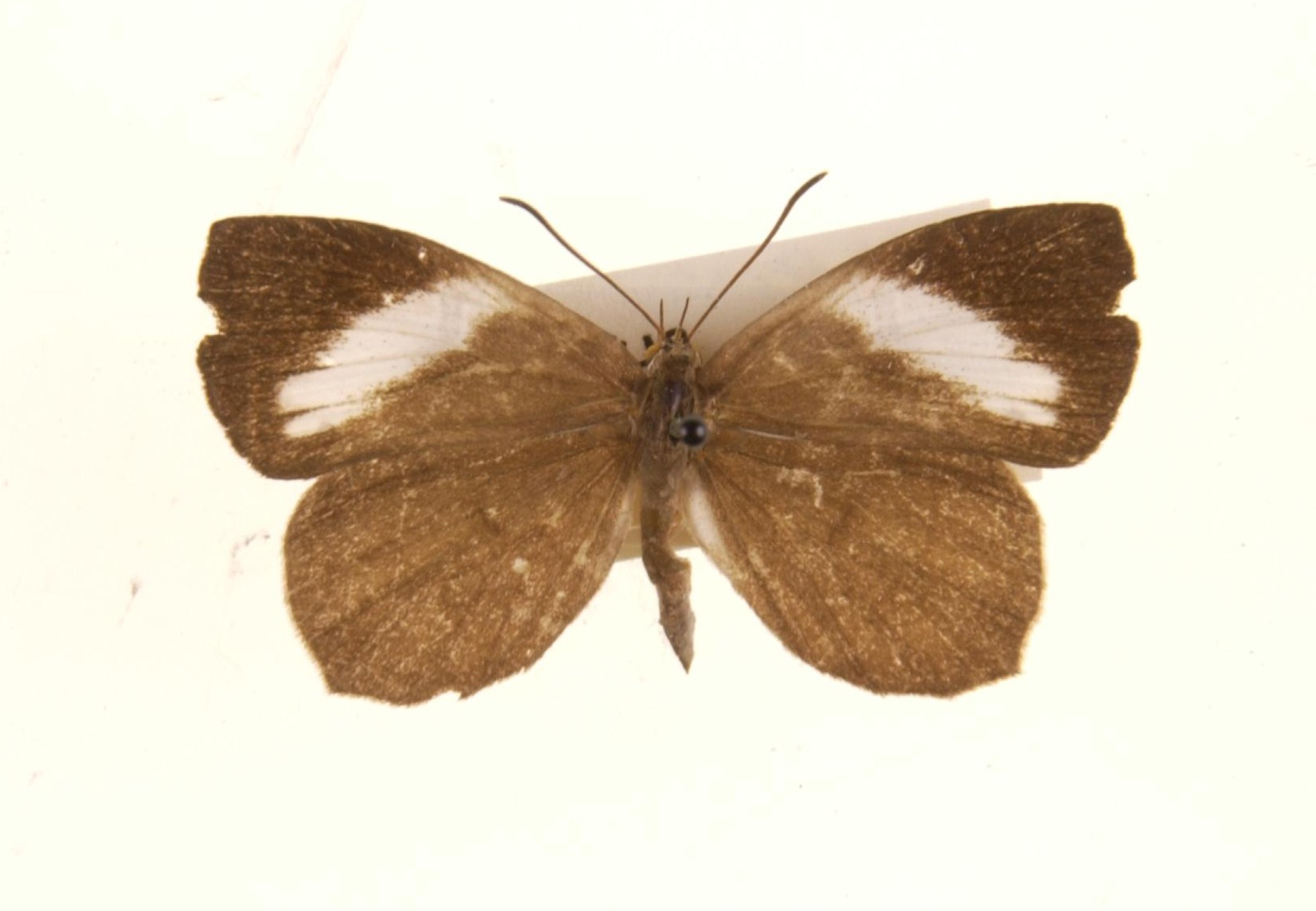 biggsi